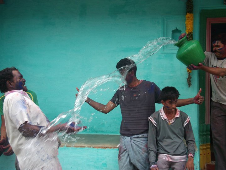 வளத்தூர் திருவிழா - மஞ்சள் நீராட்டு விழா